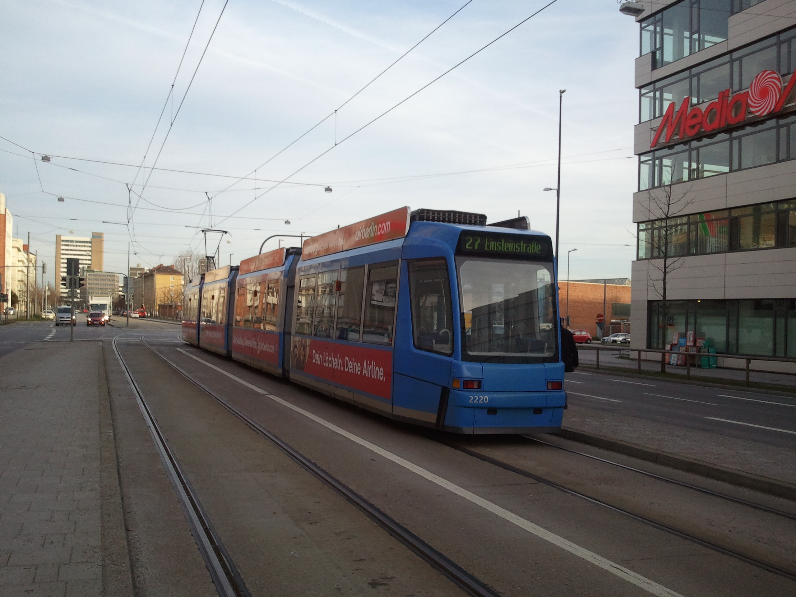 Heckansicht des R3.3 der Straßenbahn München